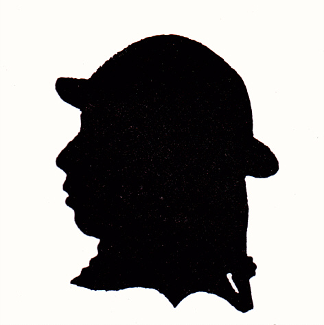 Johann Peter Hebel, Scherenschnitt, Künstler unbekannt, 1774-78